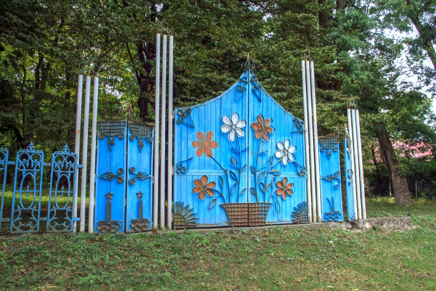 Темелеуцкий парк, монумент природы, находится в Приднестровия, Каменский район, с. Темелеуць (код MD-CC-map-005)